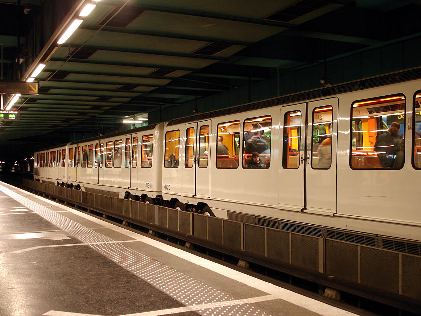 Station Saint-Charles du métro de Marseille, France.